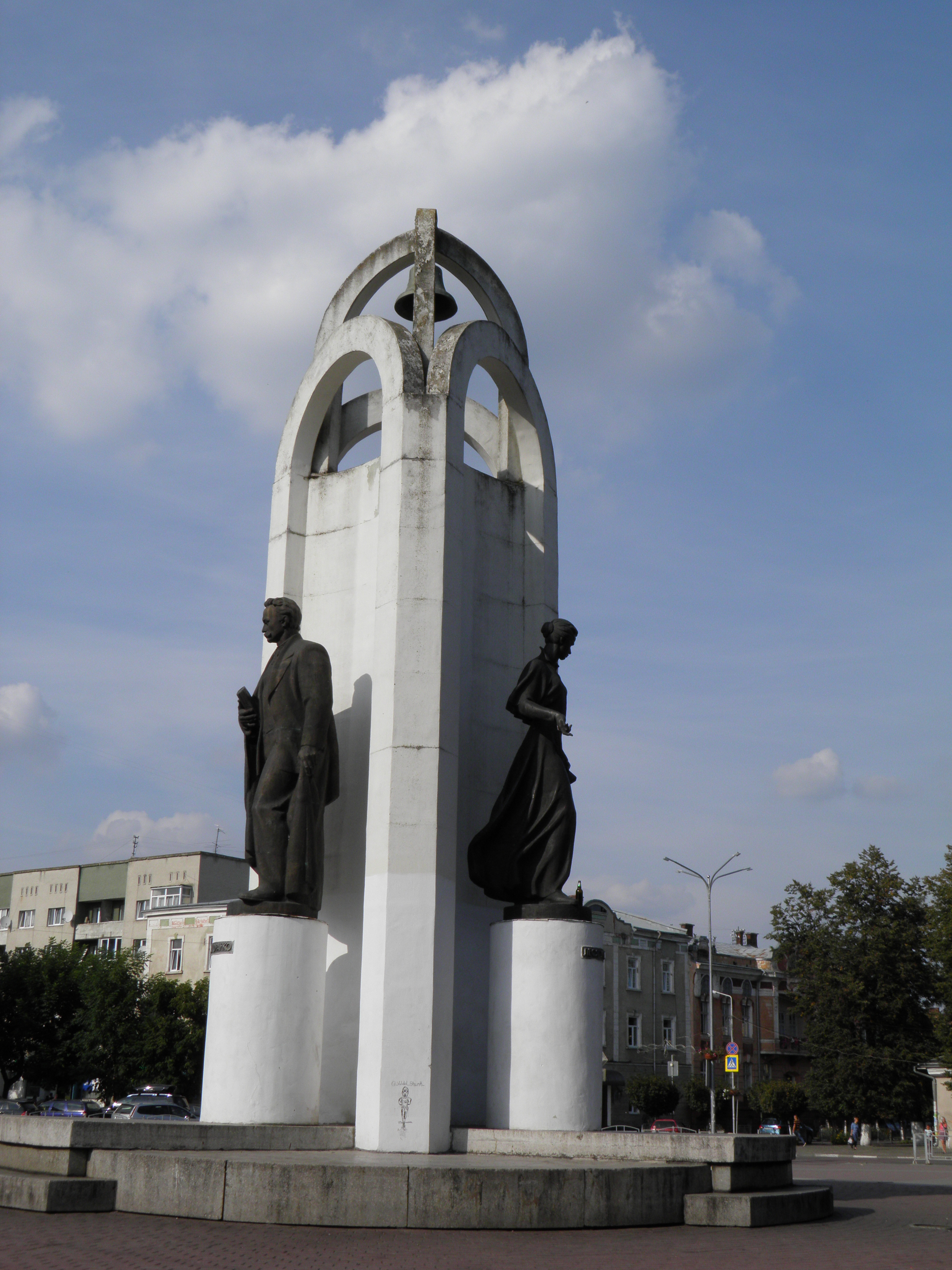 Пам'ятник Шевченку Т., Франку І. та Лесі Українці (скульптори Василь і Володимир Одрехівські, архітектор В. Сколоздра, скульптурна композиція; Матеріал: бронза, мармурова крихта), Стрий, пл. Незалежності